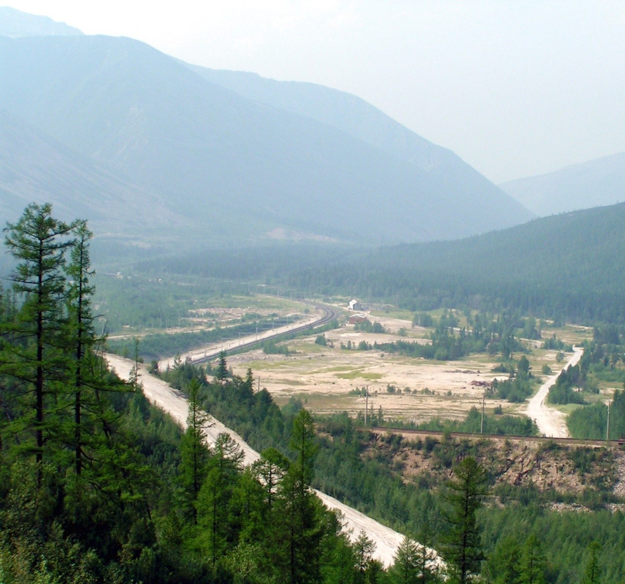 Бывший посёлок Тоннельный на БАМ